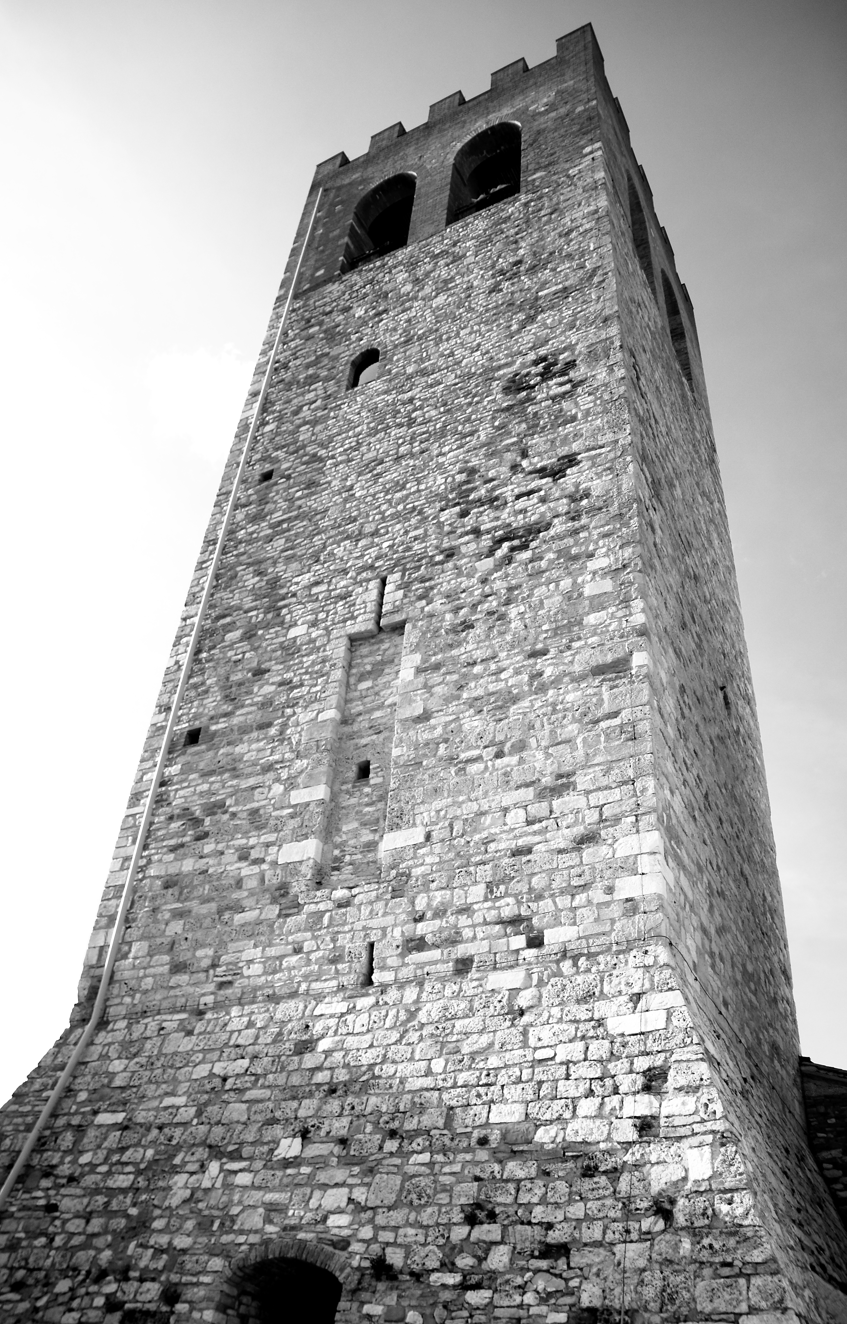 Torre civica This is a photo of a monument which is part of cultural heritage of Italy.